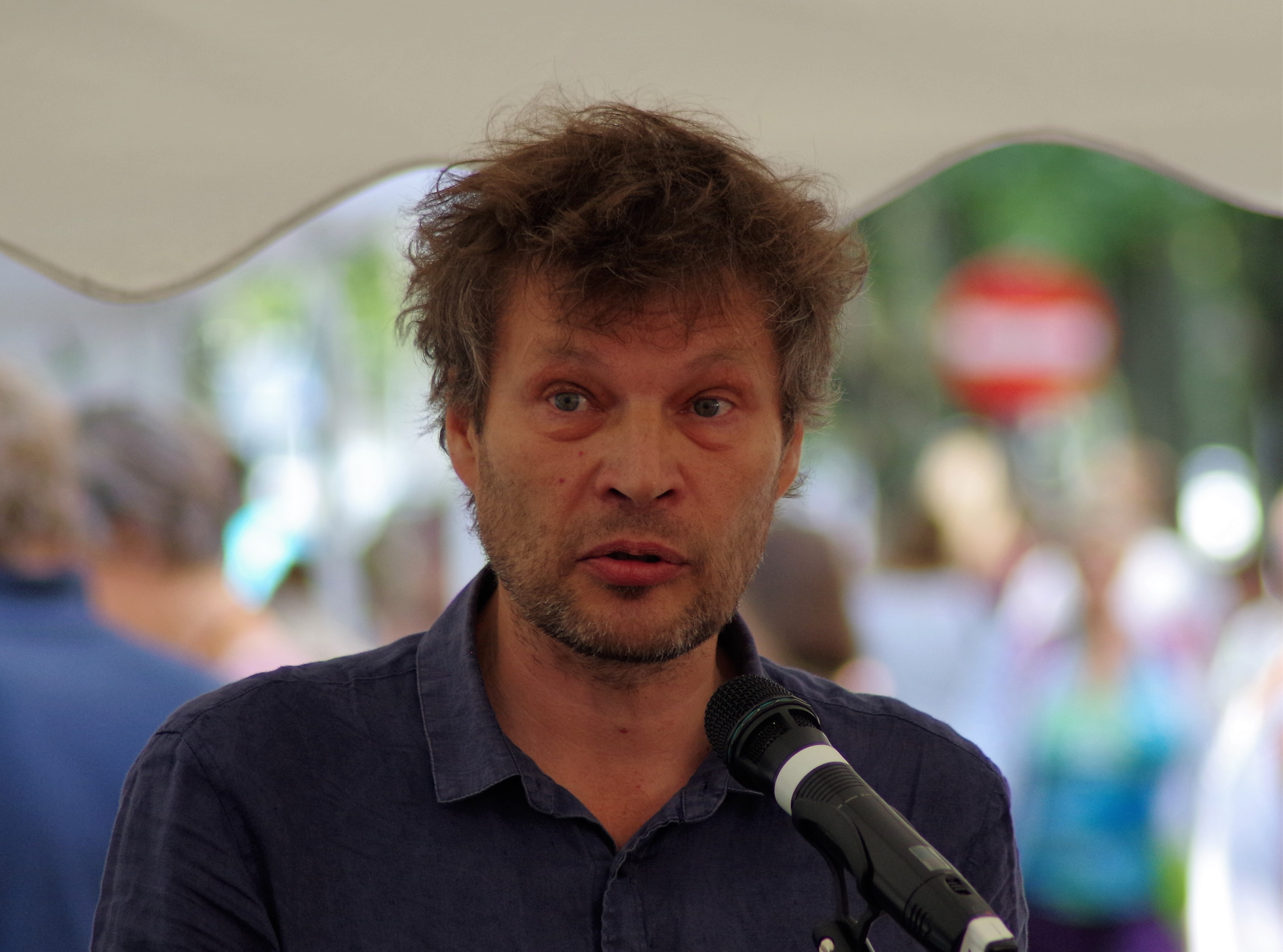 Andrei Hvostov Kirjandustänava festivalil 2018